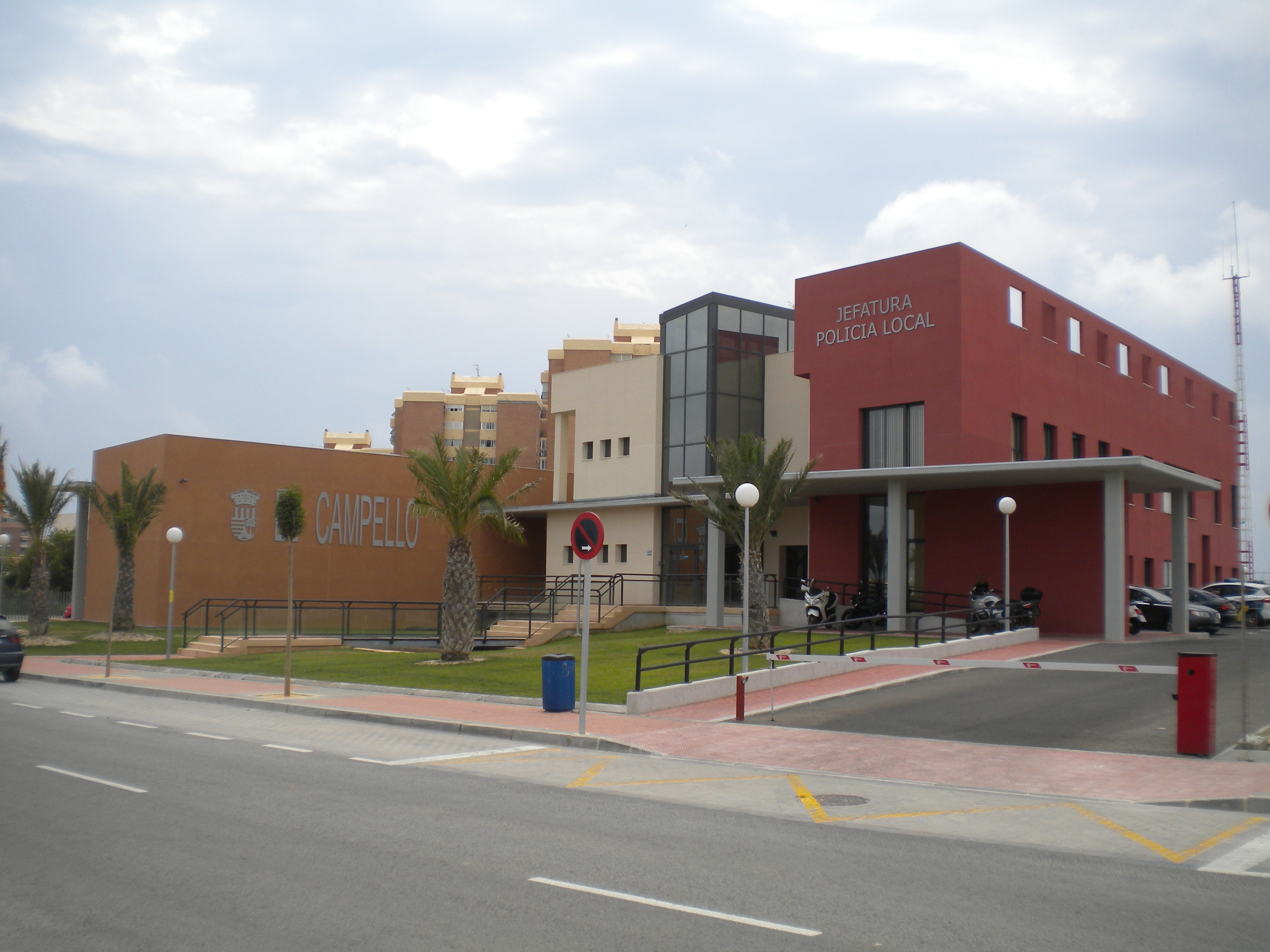 Jefatura Policía Local de El Campello (Alicante, España)